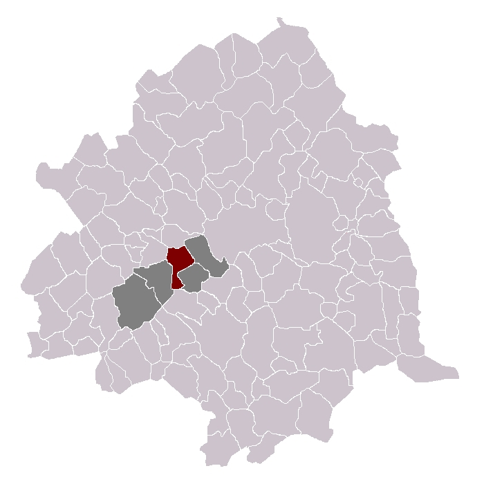 Haubourdin dans son canton et son arrondissement